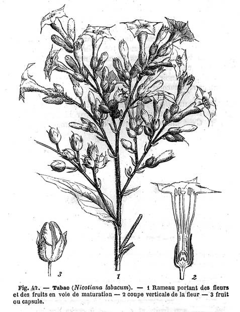 Floraison du tabac Planche extraite de l'ouvrage Éléments de botanique (Léon Marchand, Hachette 1869) Ouvrage tombé dans le domaine public Scan : Jean Tosti (Licence GDFL) Jean Tosti